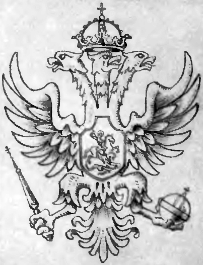 Герб царя Алексея Михайловича, согласно источнику.